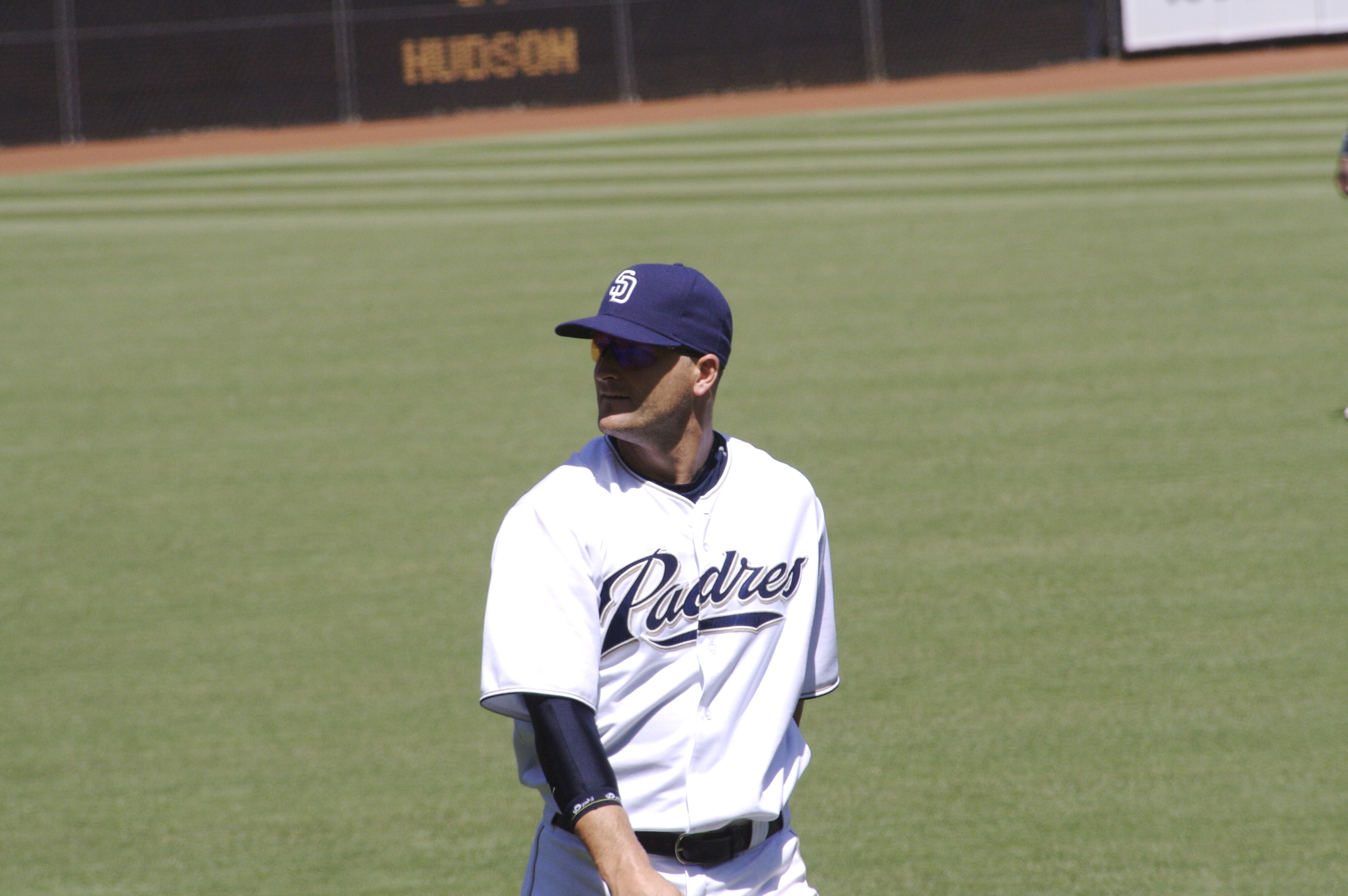 Russell Branyan